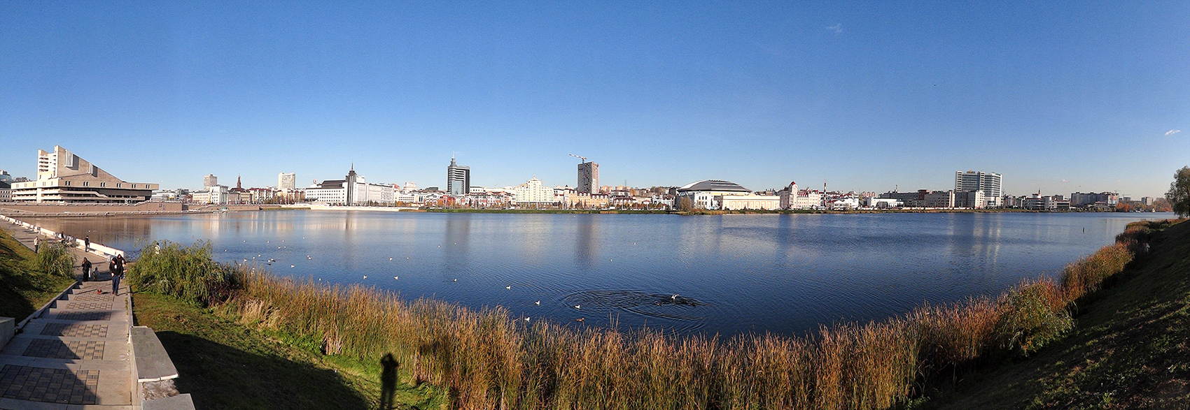 Казань. Озеро Нижний Кабан